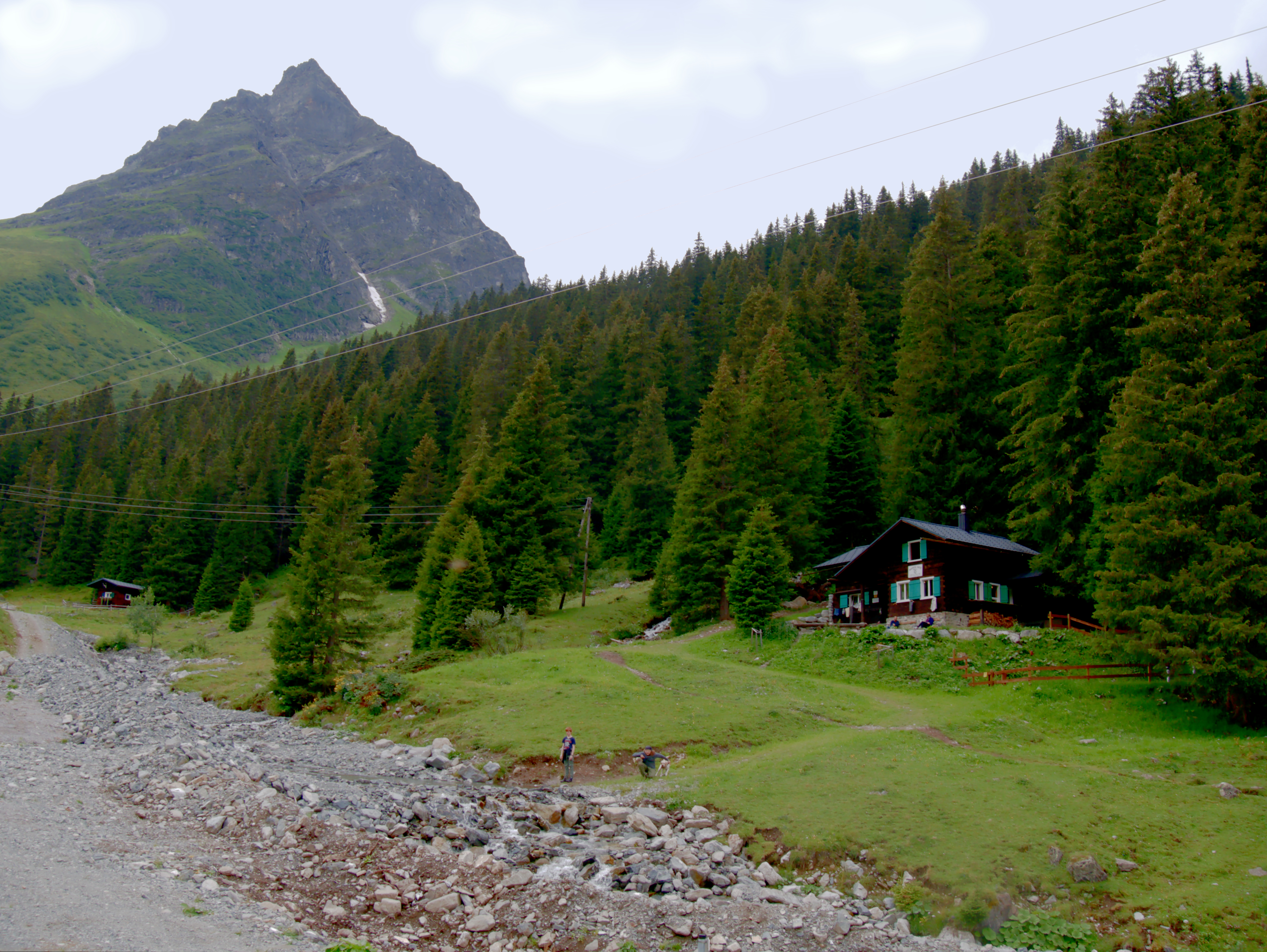 Madrisahütte (rechts) mit Madrisa im Valzifenztal oberhalb von Gargellen